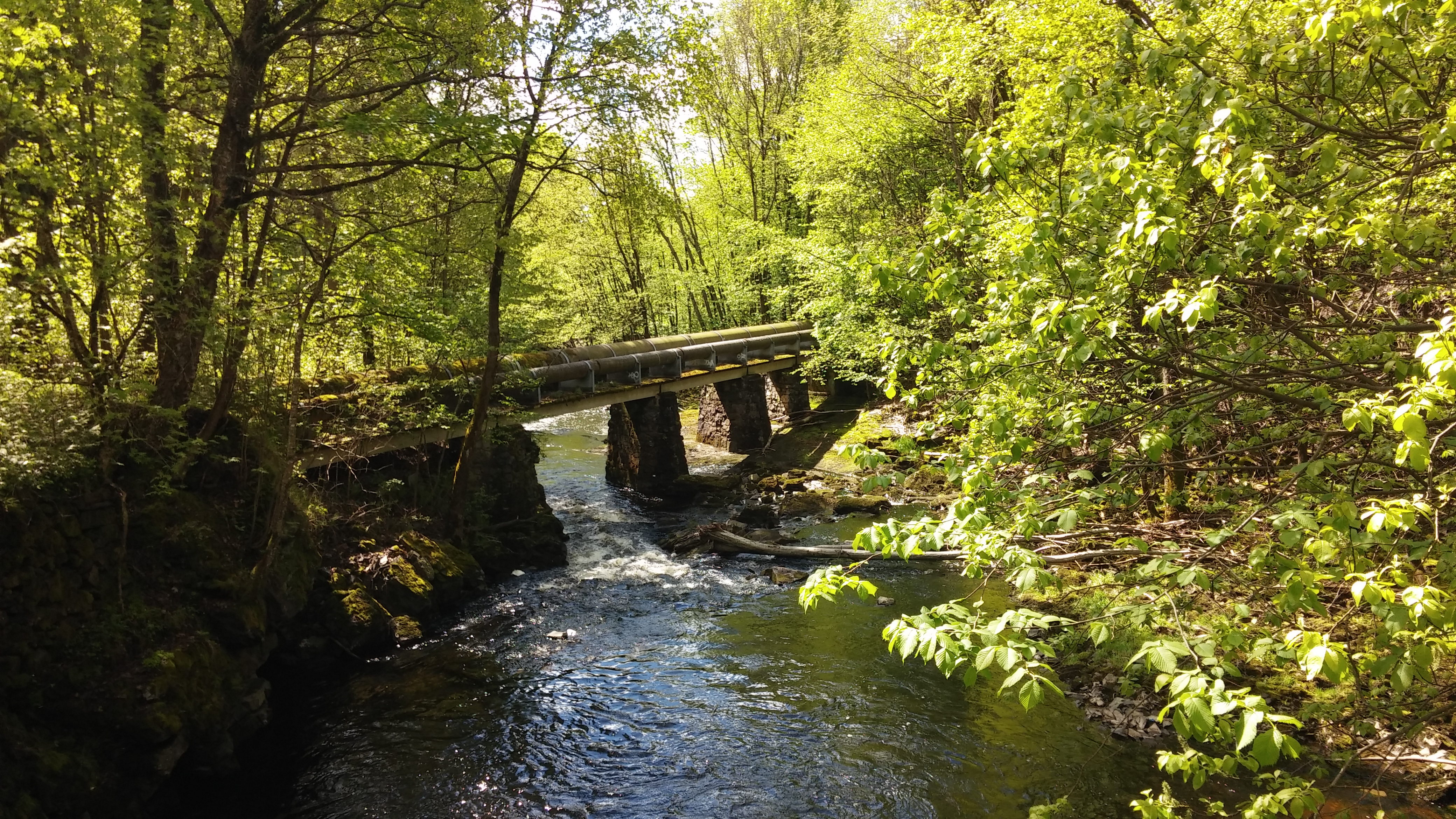 Rørgangen til Spikerbrukfallet kraftstasjon i Bærum